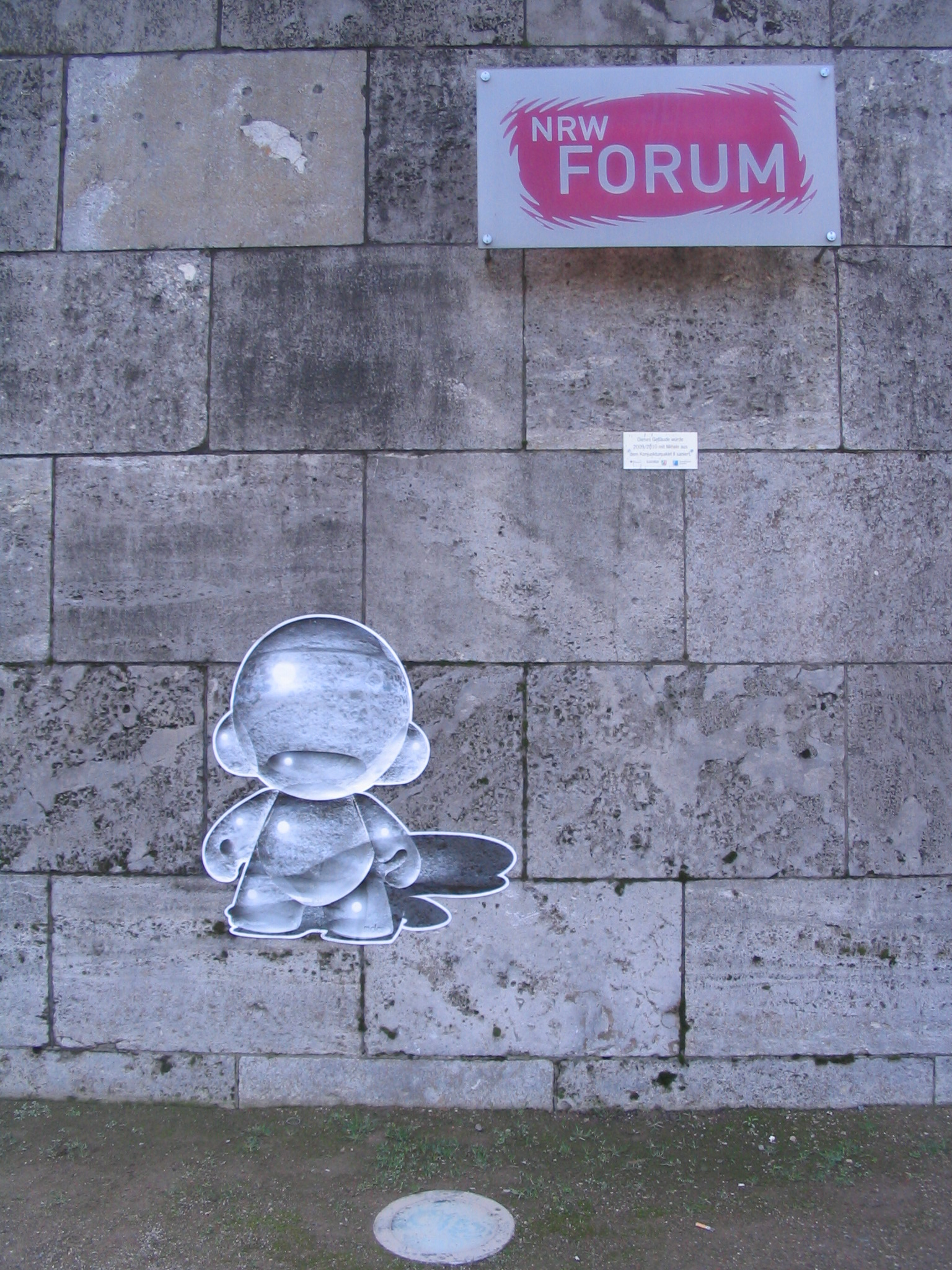 Düsseldorf, Außenwand des NRW Forums: Figur aus Folie, geklebt. Eingedruckte Signatur rechts unten.